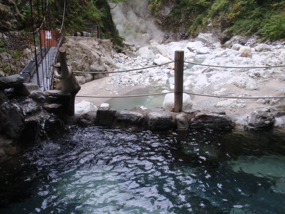 黒薙温泉天女の湯